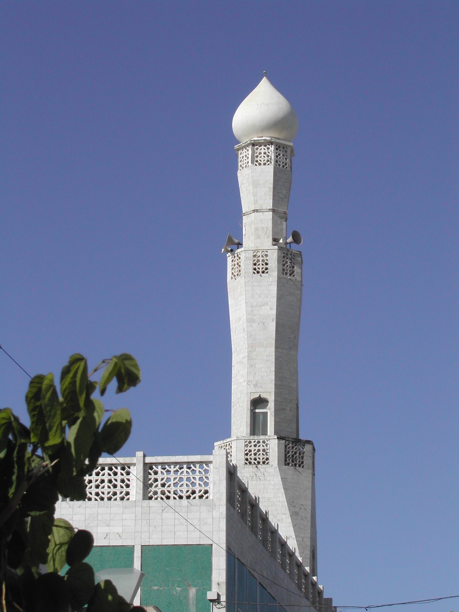 Photo du minaret de la mosquée Noor-al-Islam à Saint-Denis de la Réunion. en france